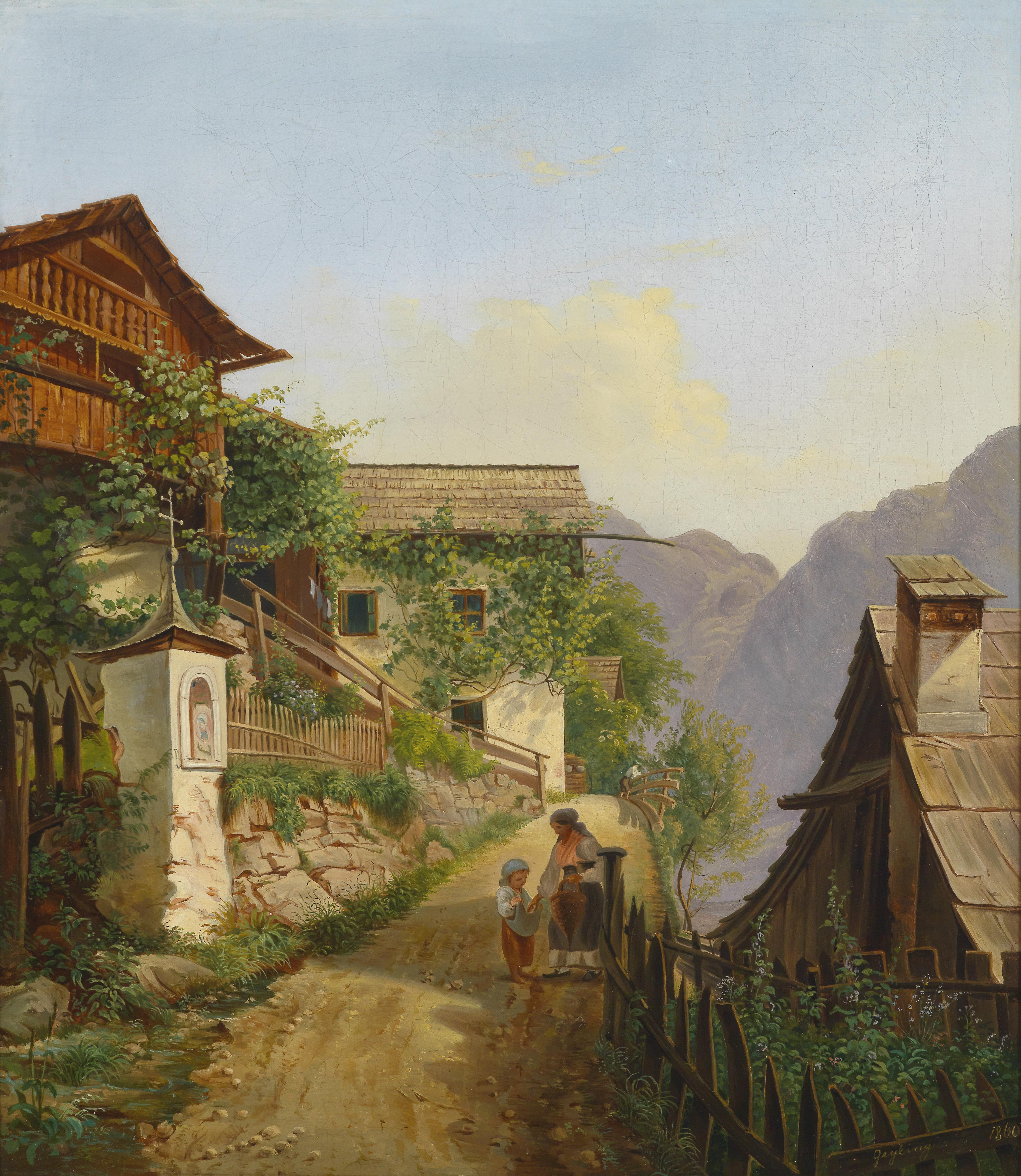 Motiv aus Hallstat